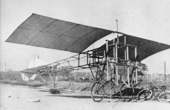 Aeroplano de Juan Pablo Aldasoro 1909